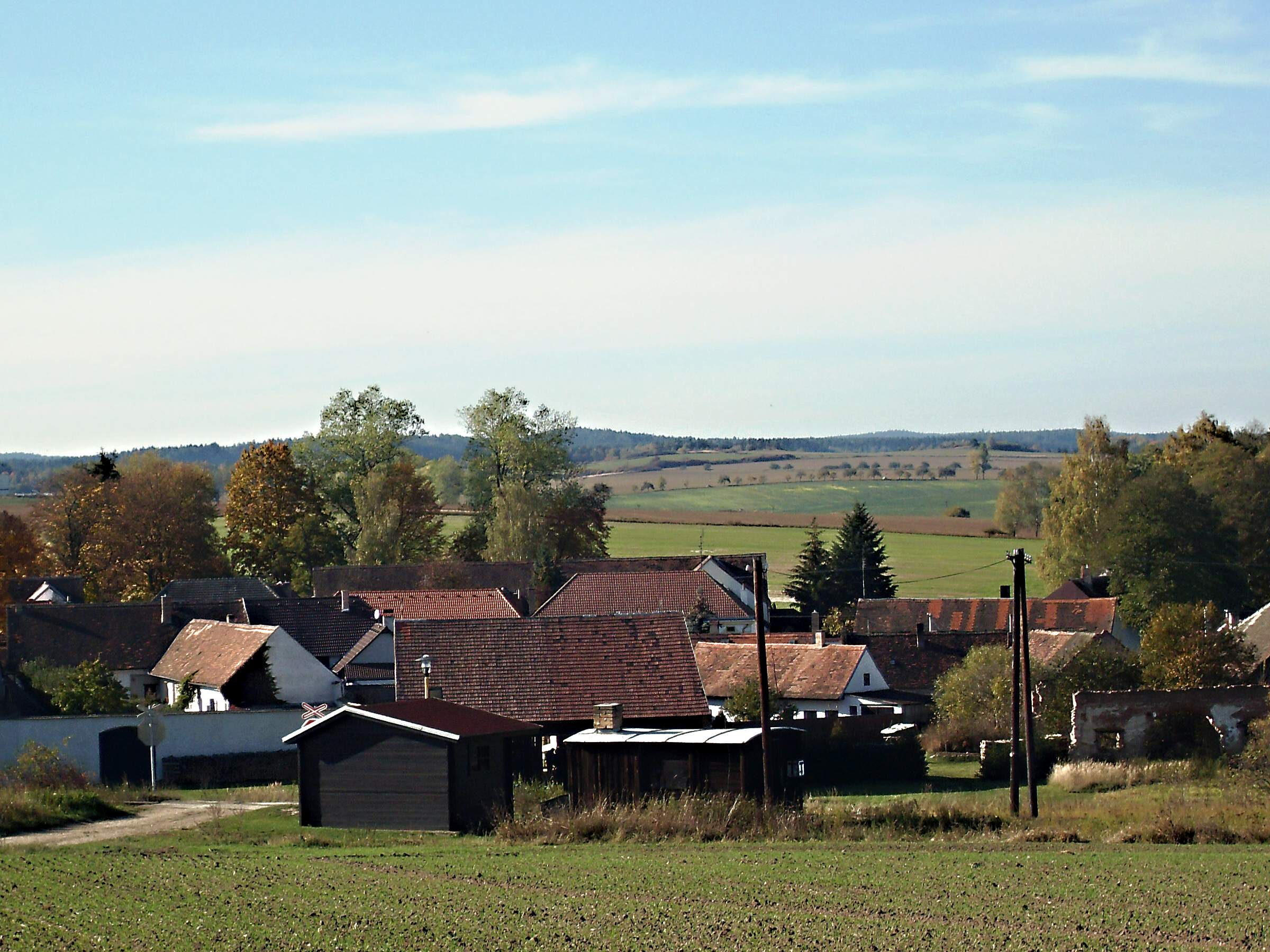 Pohled na vesnici Urbaneč od jihovýchodu